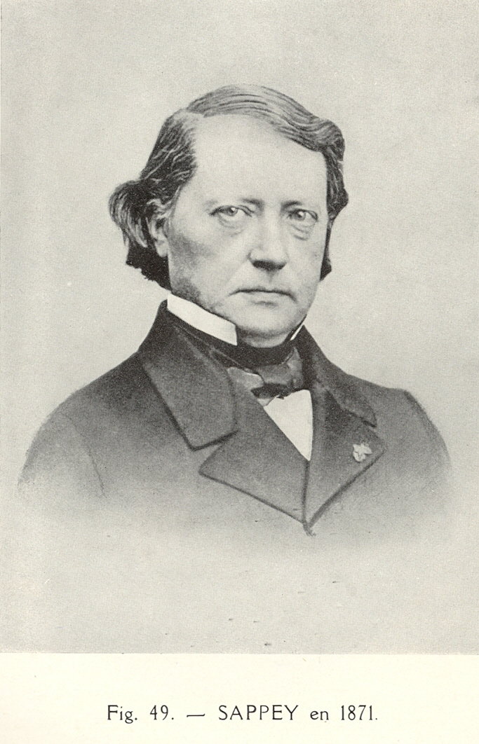 Portrait de Constant Sappey en 1871